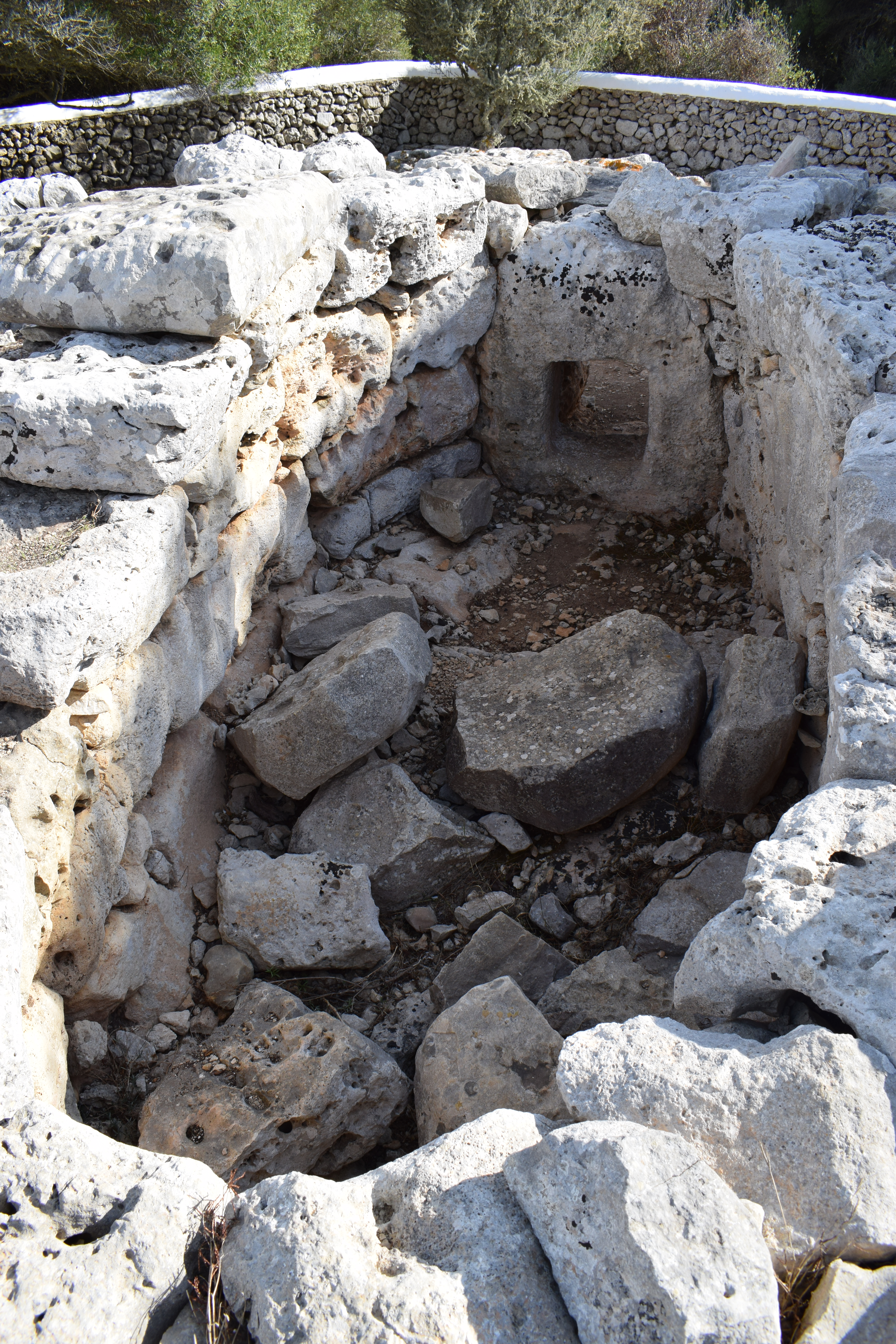 Die Naveta de Biniac West in der Gemeinde Alaior, Menorca.